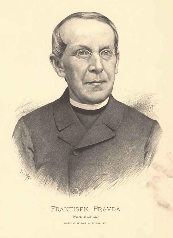 Portréty českých osobností od Jana Vilímka